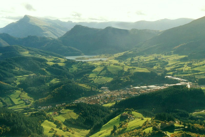 Vista tomada desde el monte Murugain, con el embalse de Urkulu y el monte Aloñamendi al fondo Vista de Arechavaleta obtenida desde el monte Murugain, con el pantano de Urkulu y el monte Aloñamendi al fondo. Jesús Mª Toledo